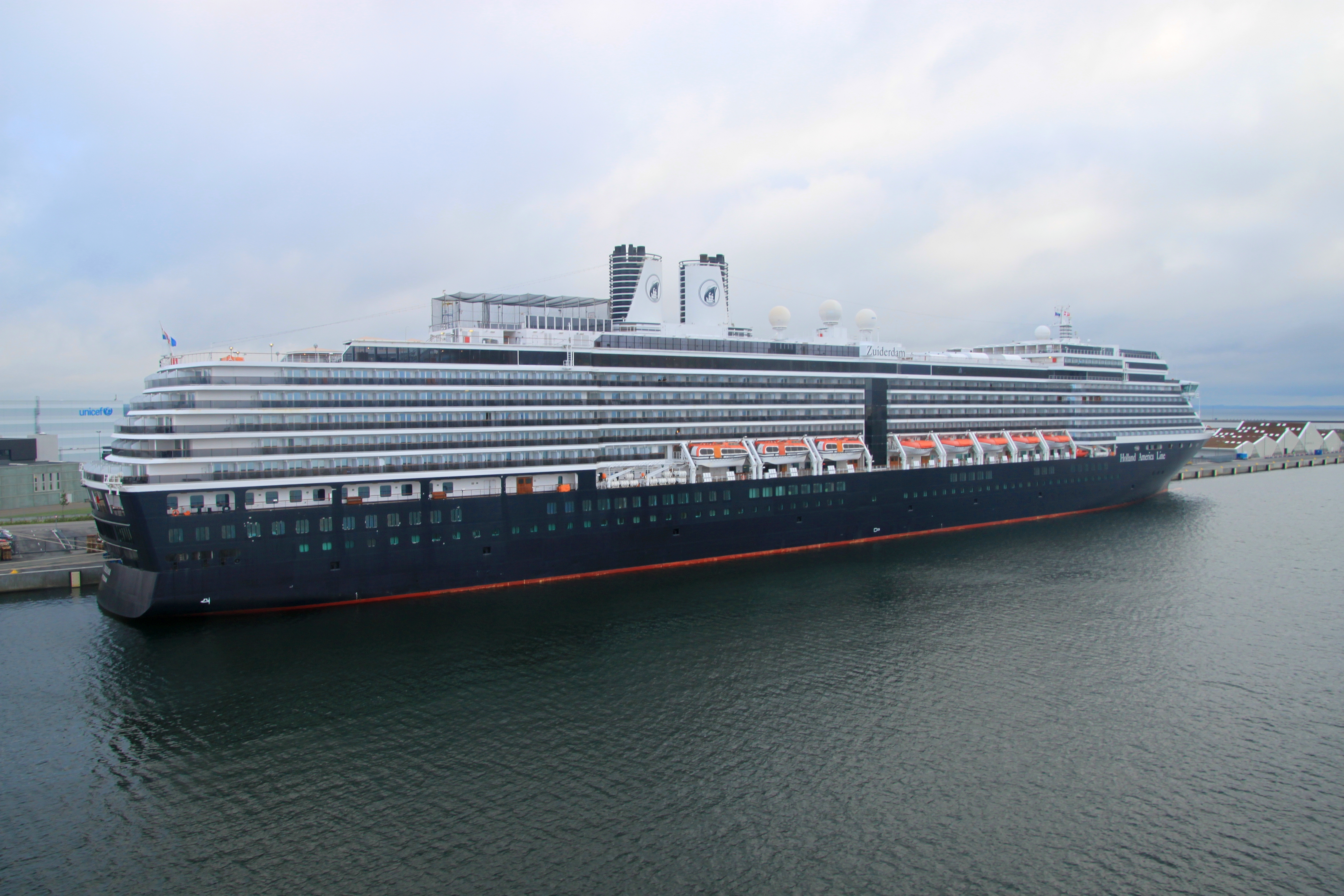 ZUIDERDAM am CruiseCenter in Kopenhagen